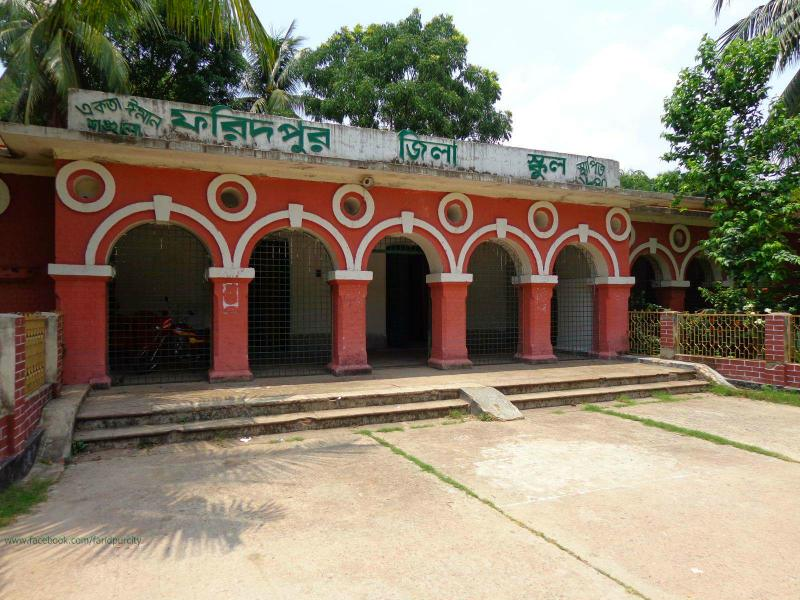 ফরিদপুর জিলা স্কুল।